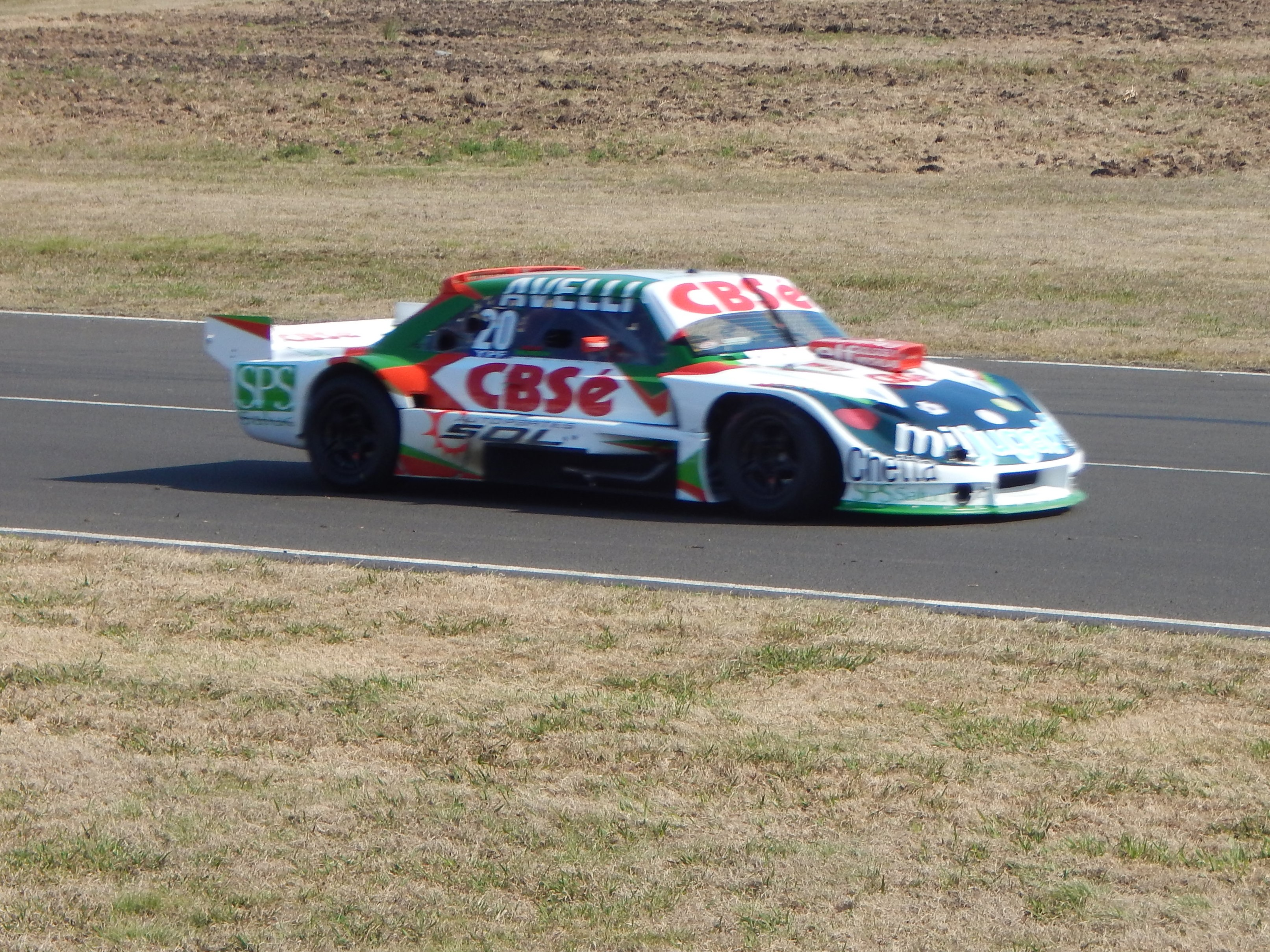 Carlos Okulovich Paraná 2015